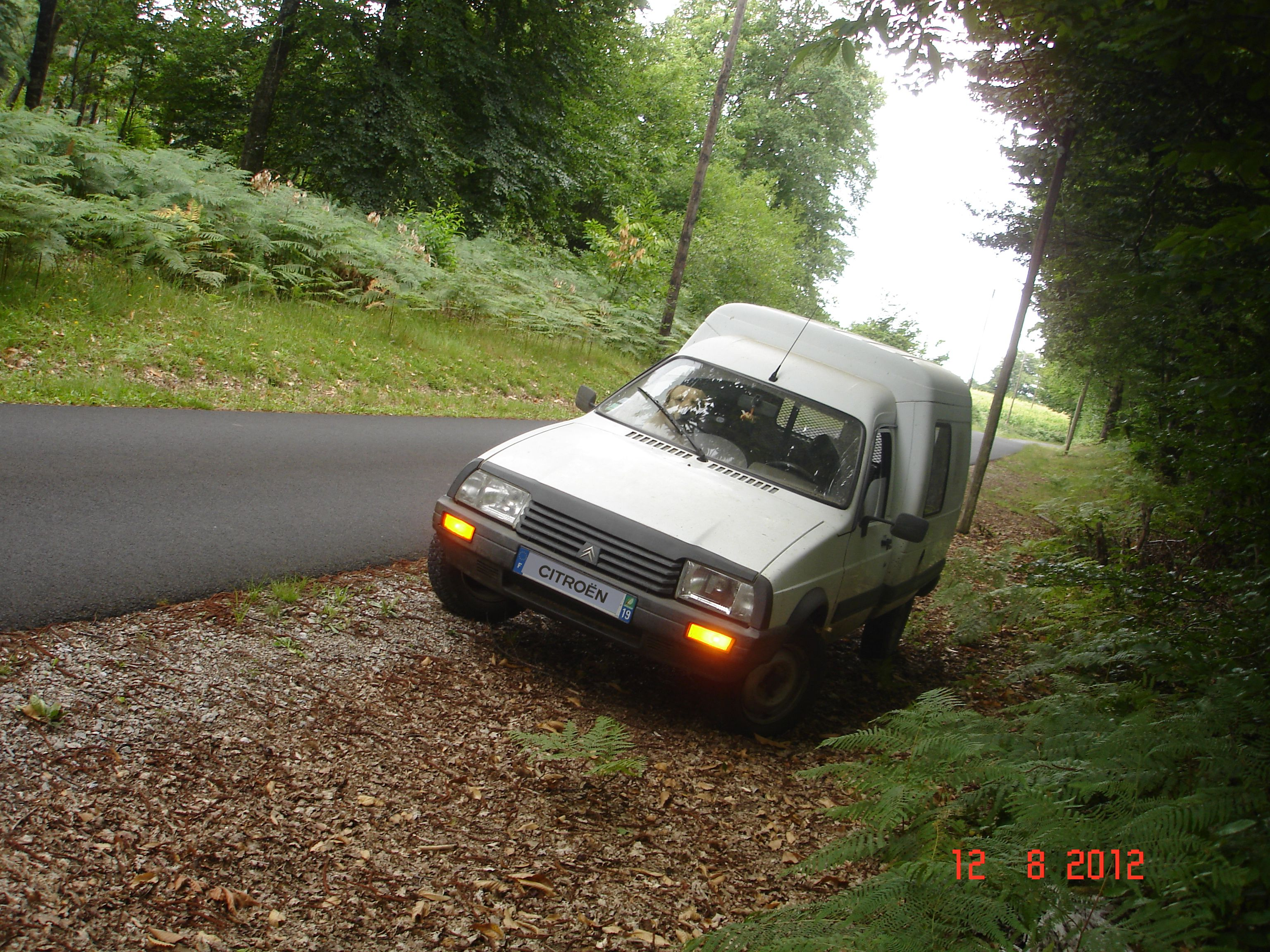 C'est un Citroën C15 diesel de 1997, photographié ici dans son meilleur élément : une route de campagne.